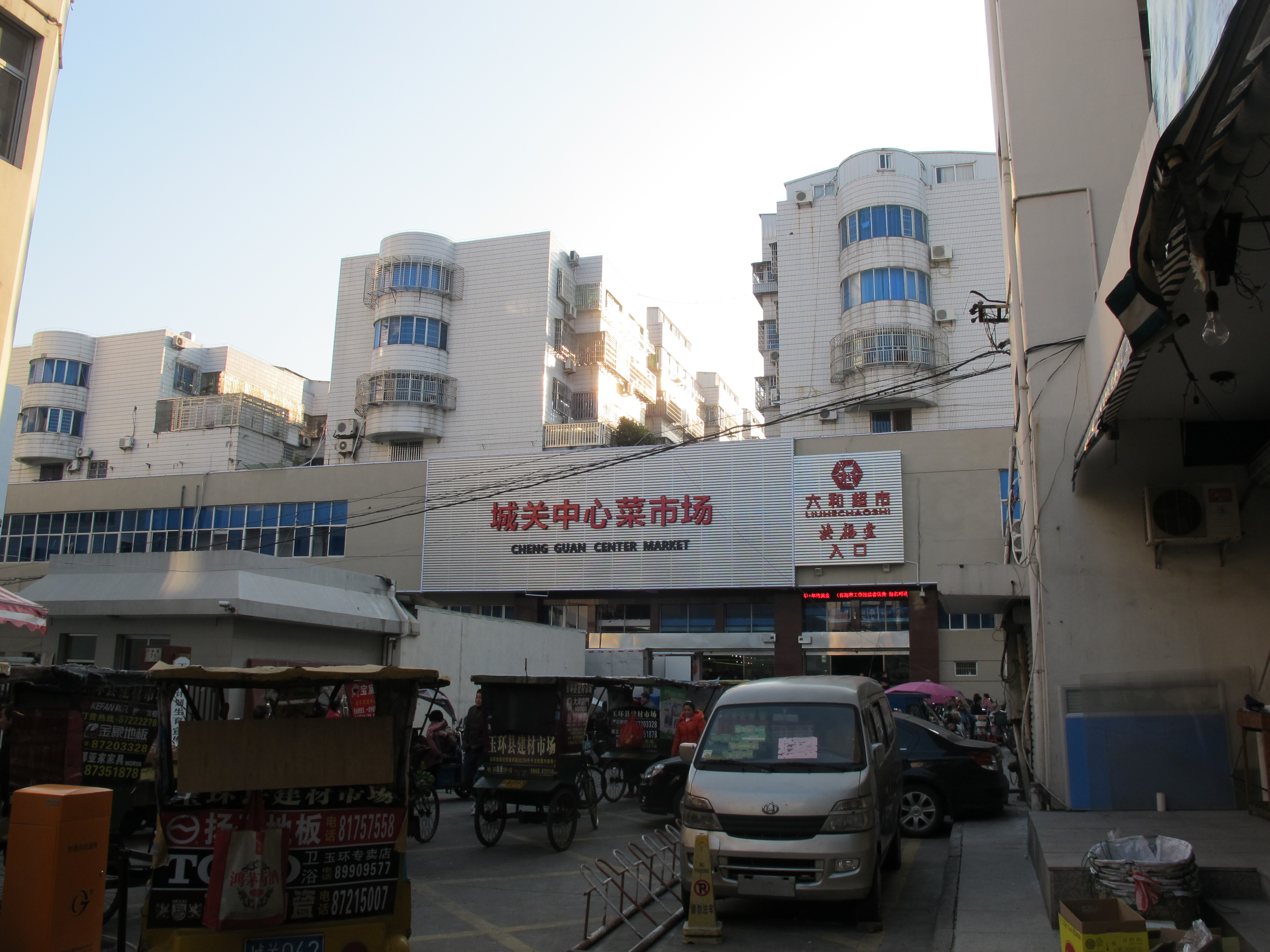 玉环中心菜市场